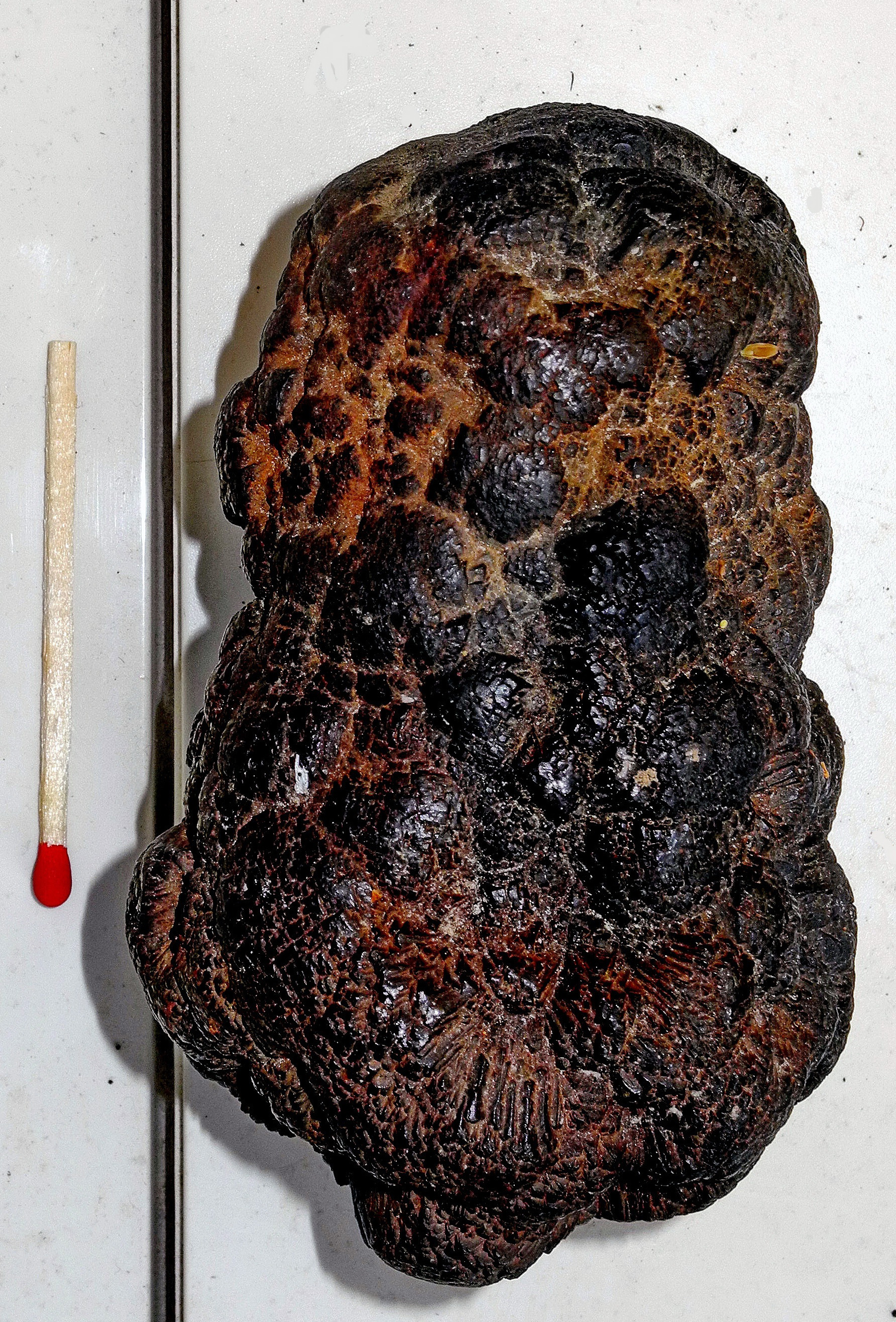 Nodule de marcassite (900 gr)